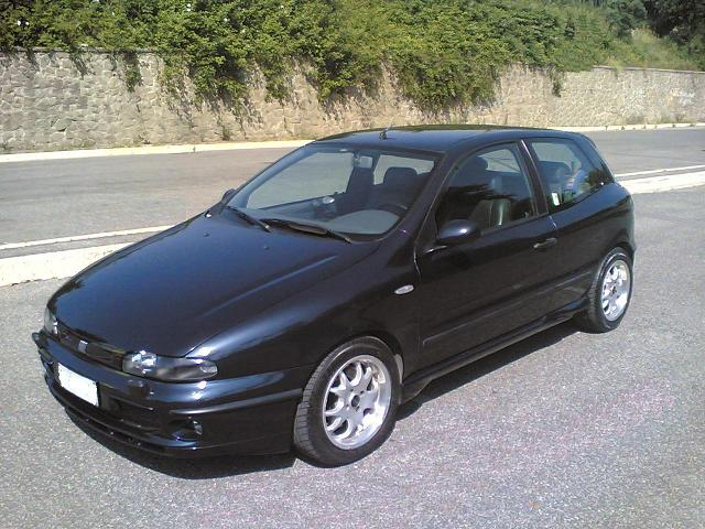 フィアット・ブラビッシモ Fiat Bravo 1998–1999.